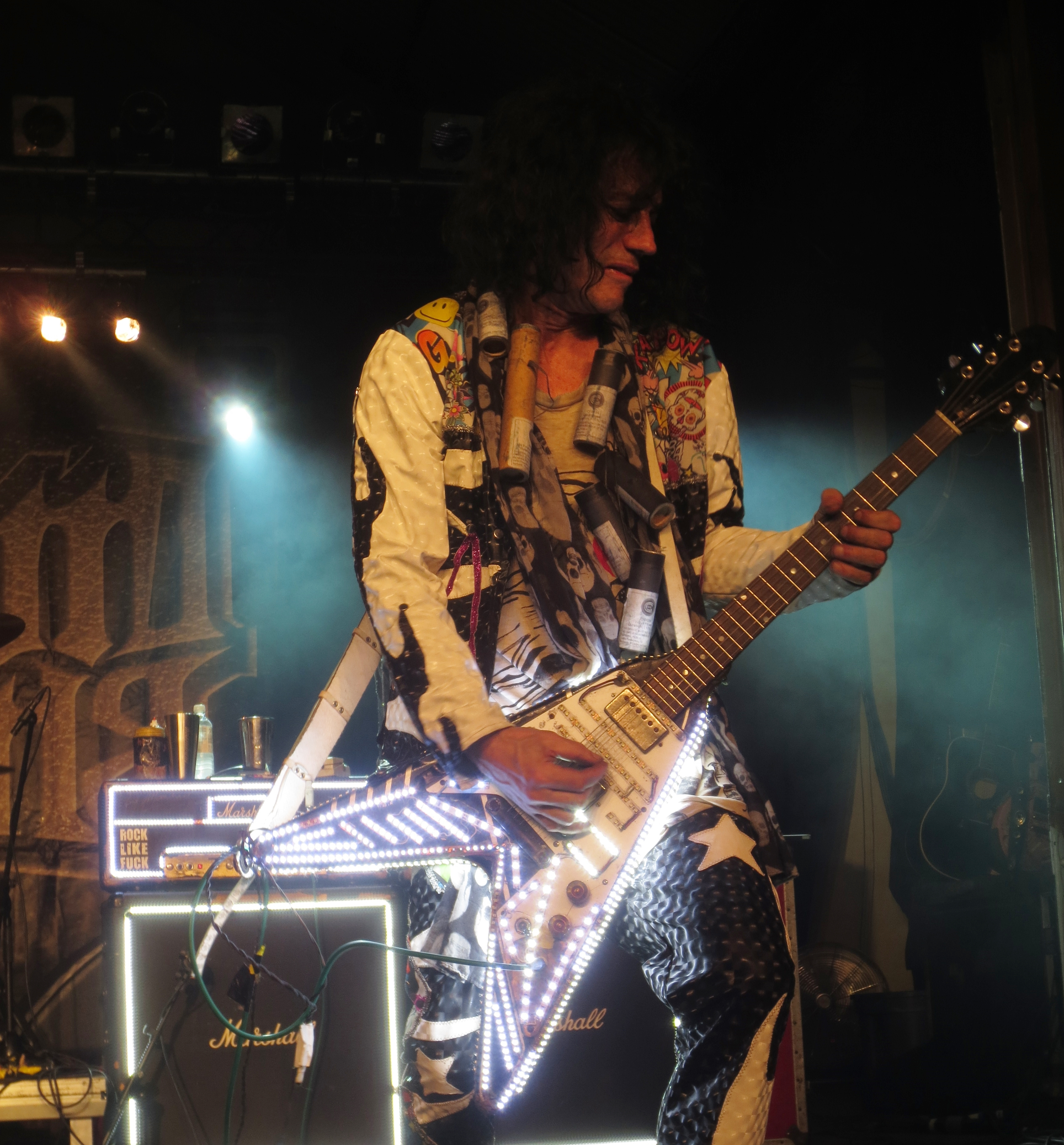 Adam Bomb in Berlin 2016